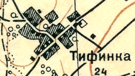 Топографическая карта Ленинградской области, квадрат О-36-13-А-а (Большая Пудость), деревня Тихвинка